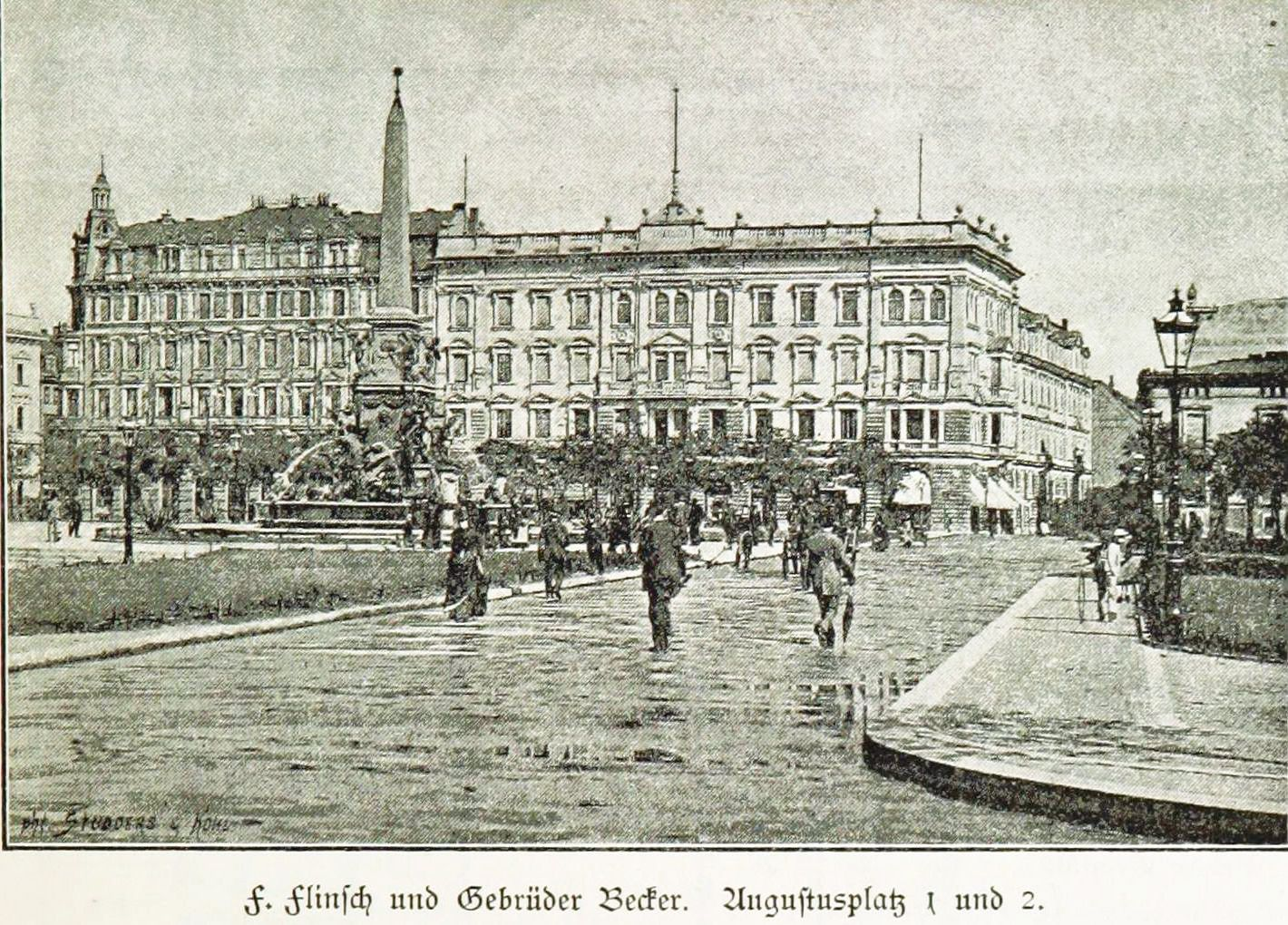 Leipzig Augustusplatz Ostseite um 1892 Zu sehen sind links Augustusplatz 2 Ecke Grimmaischer Steinweg (Papierhandlung Ferdinand Traugott Flinsch) sowie rechts Augustusplatz 1 Ecke Johannisgasse (Bankiersfamilie Gebrüder Alfred und Edmund Becker), die bis 1945 bis zum Augustusplatz durch verlief. Die beiden zu sehenden Gebäude wurden errichtet: - Augustusplatz 1 Ecke Johannisgasse: 1884-1887 nach Plänen von Bruno Grimm - Augustusplatz 2 Ecke Grimmaischer Steinweg: 1880 von Architekt Otto Laux